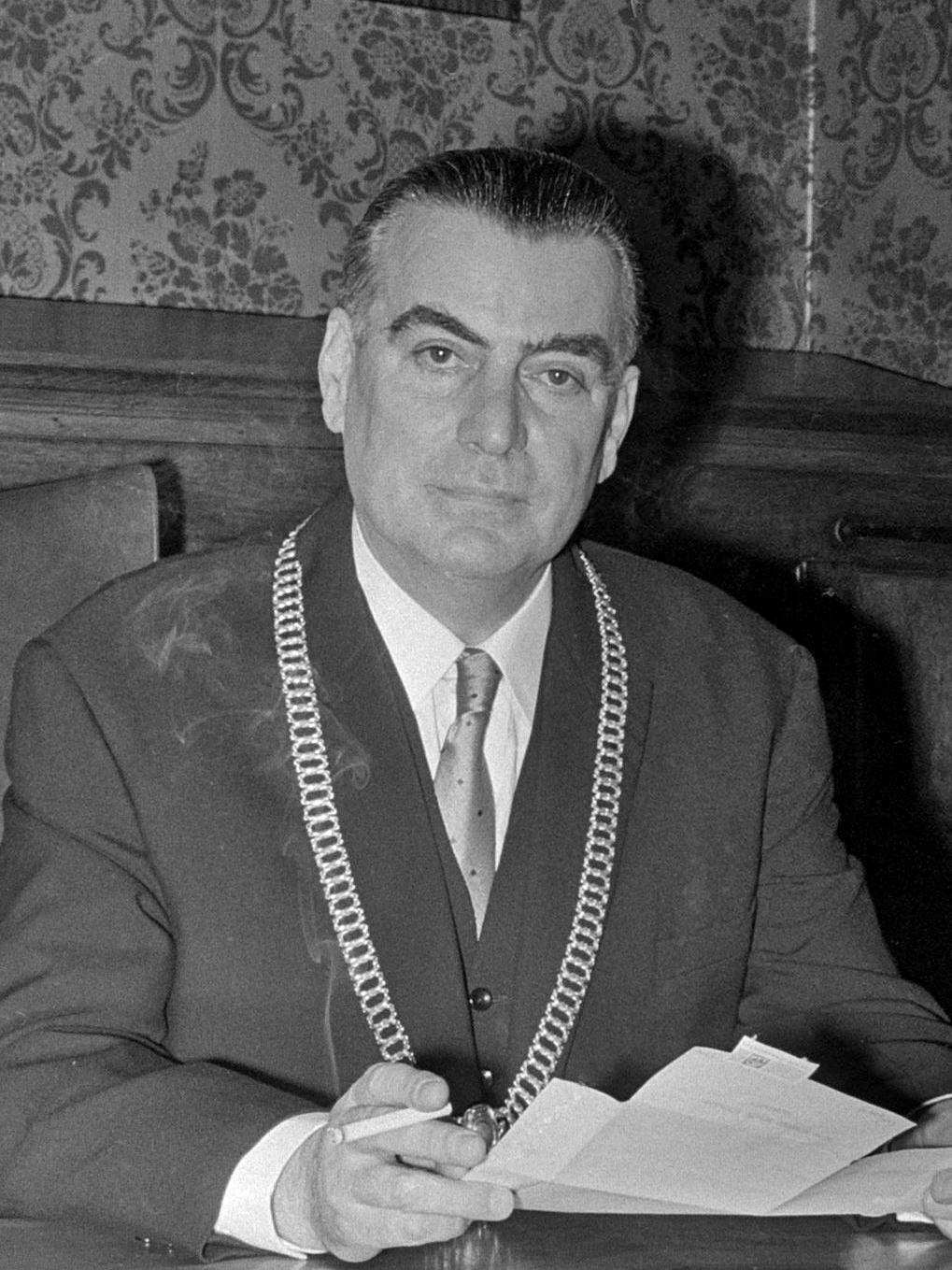 Burgemeester Berger van Groningen neemt afscheid vanwege zijn overstap van de PvdA naar DS'70 6 april 1971